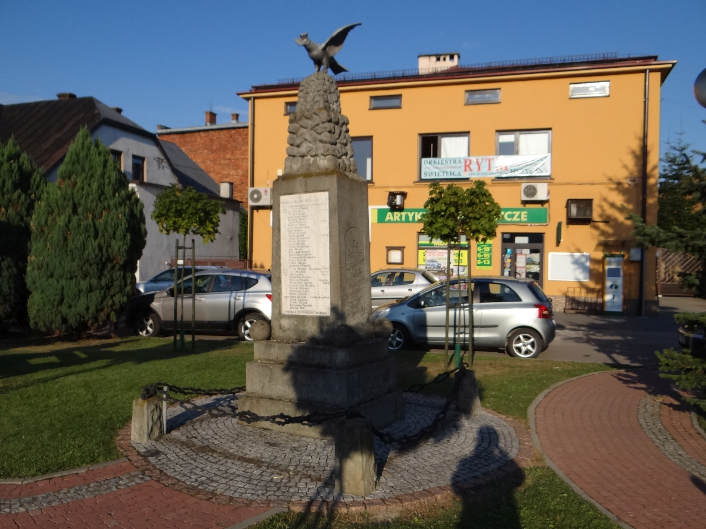 Pomnik w Zembrzycach